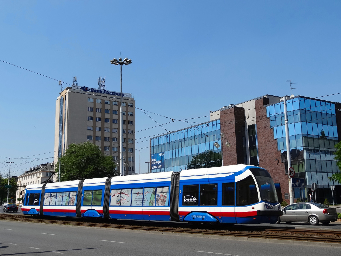 Bank Pocztowy i Citibank w Bydgoszczy przy ul. Jagiellońskiej